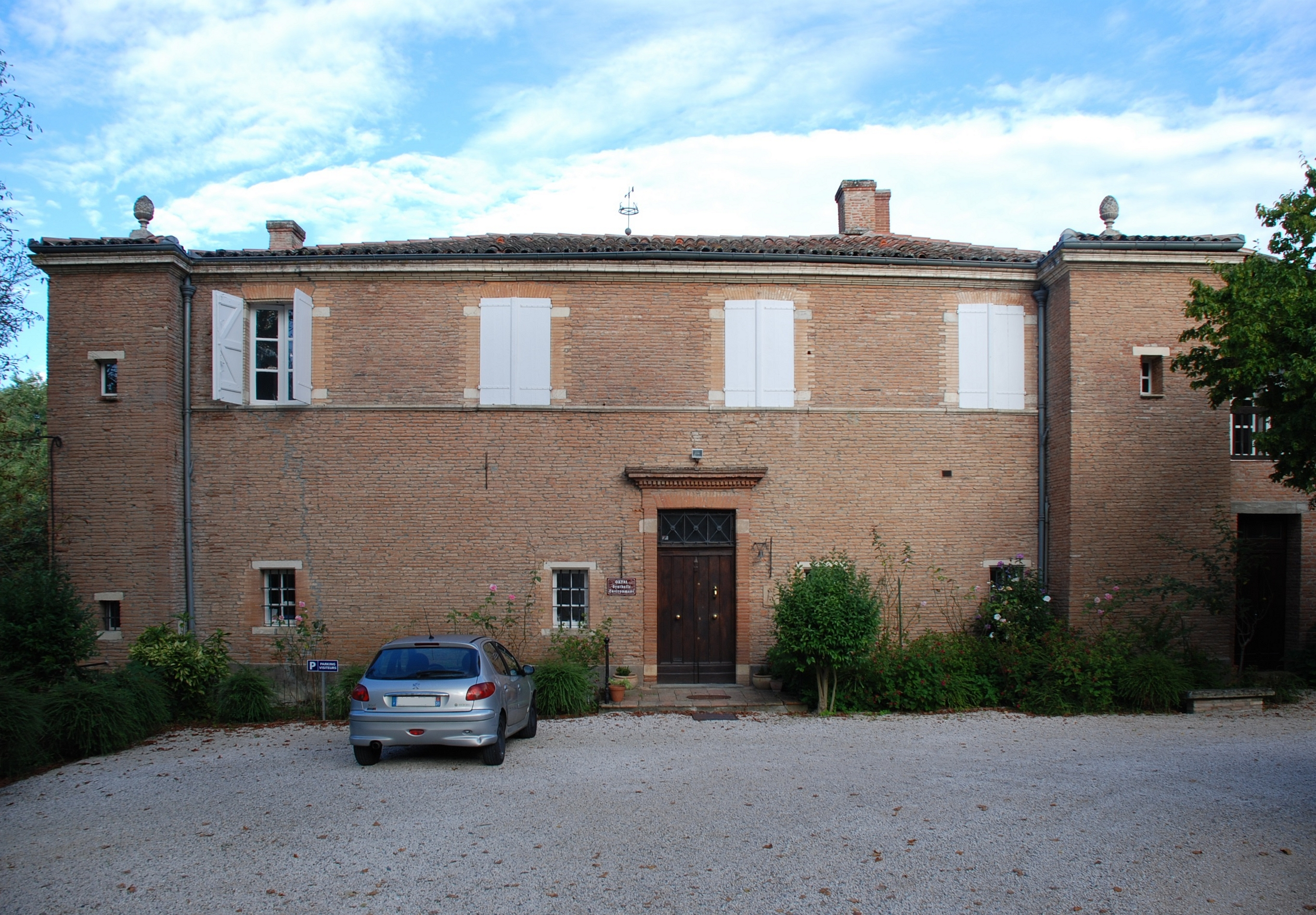 Façade cour du château de Vigoulet, à Vigoulet-Auzil, 31320, Haute-Garonne